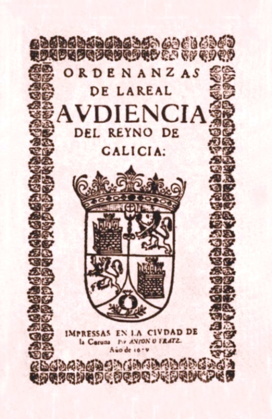 Ordenanzas de la Real Audiencia del Reyno de Galicia impressas en la ciudad de la Coruña